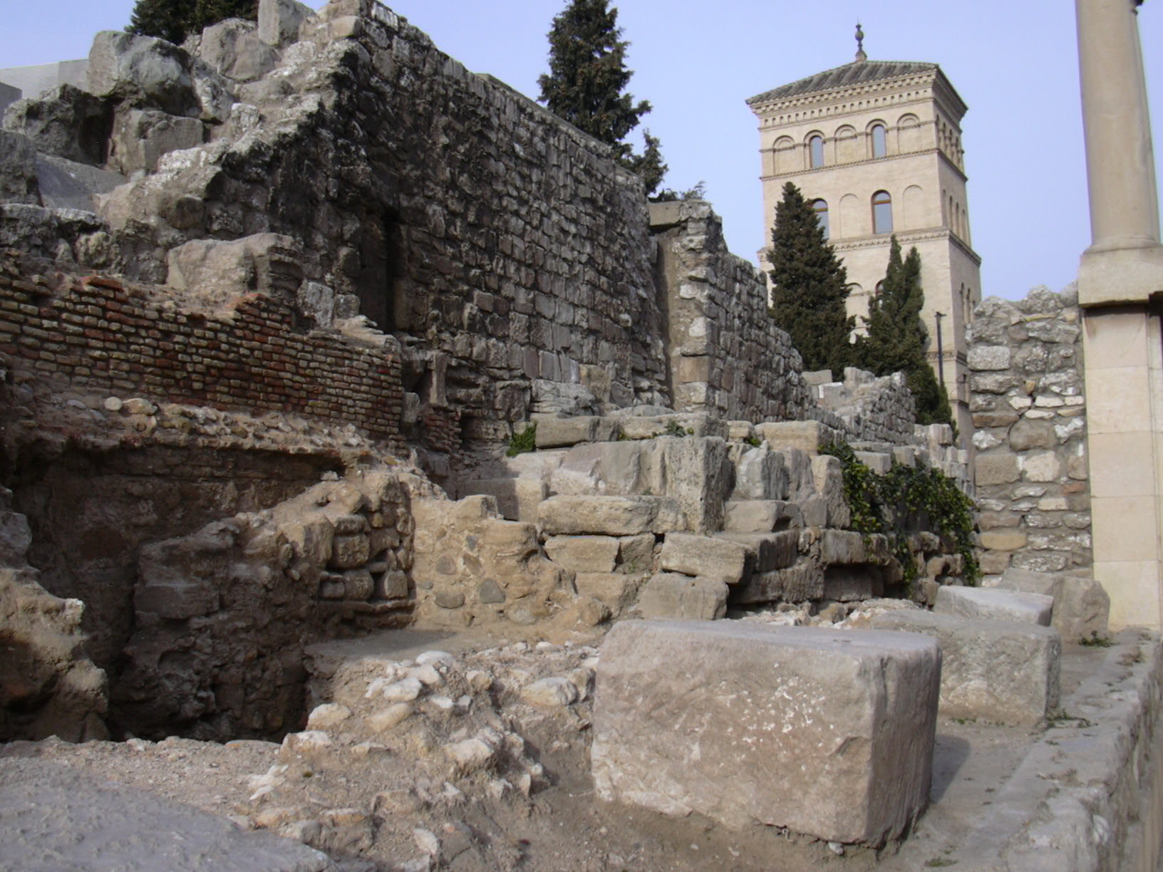 Murallas romanas de Zaragoza